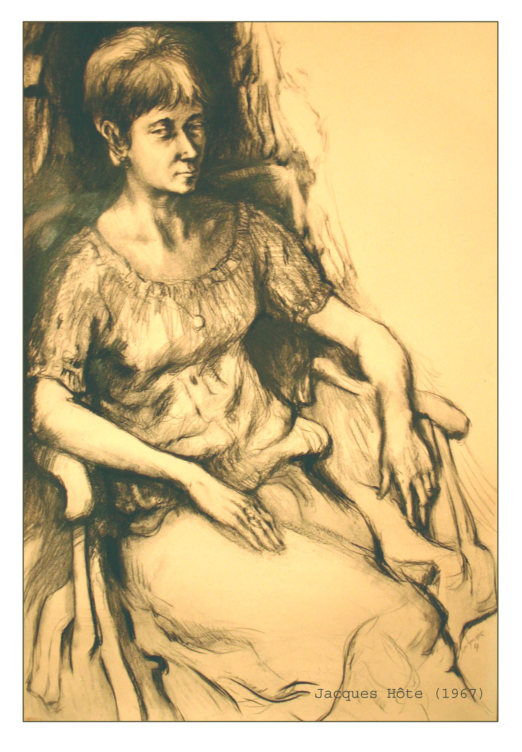 Portrait